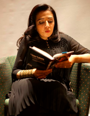 Lansering Fra Oslo til Lahore